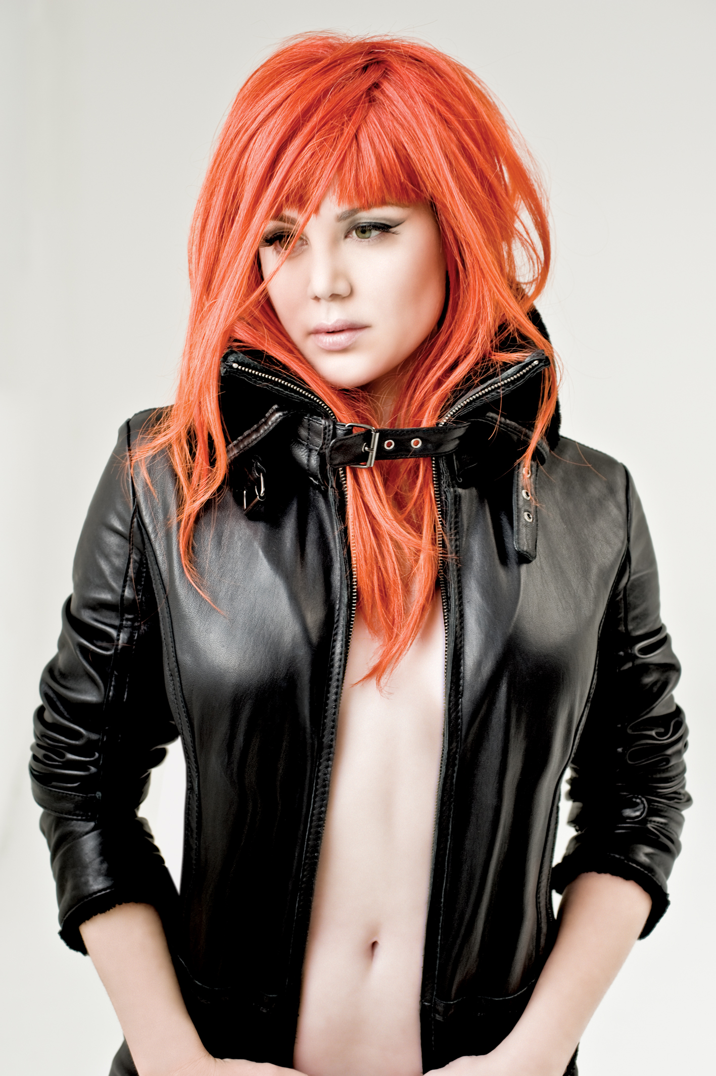 Vanessa Amorosi